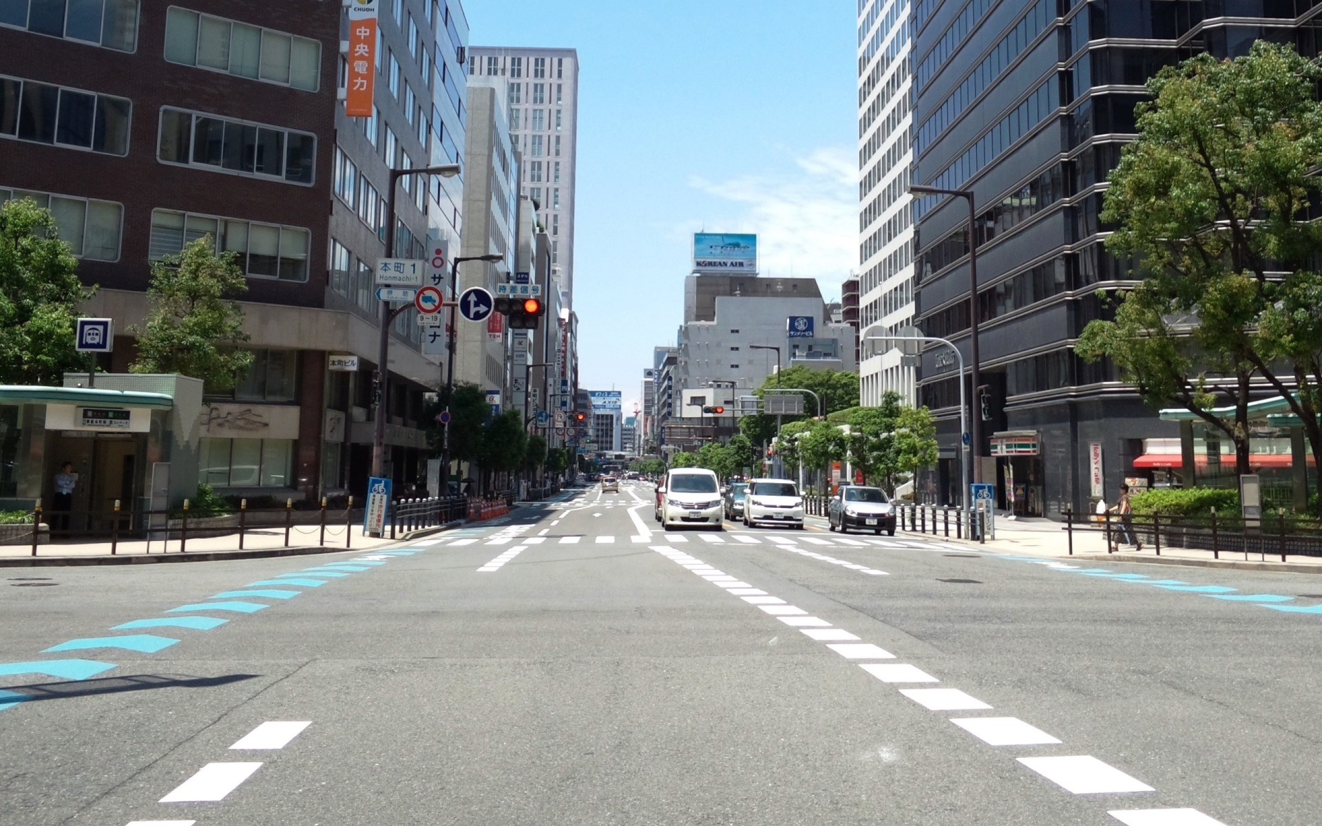 本町通・本町一交差点